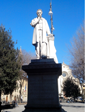 Statua dedicata al marchese Cosimo Ridolfi, fondatore della prima scuola di agronomia a Castelfiorentino, che fu anche un uomo politico